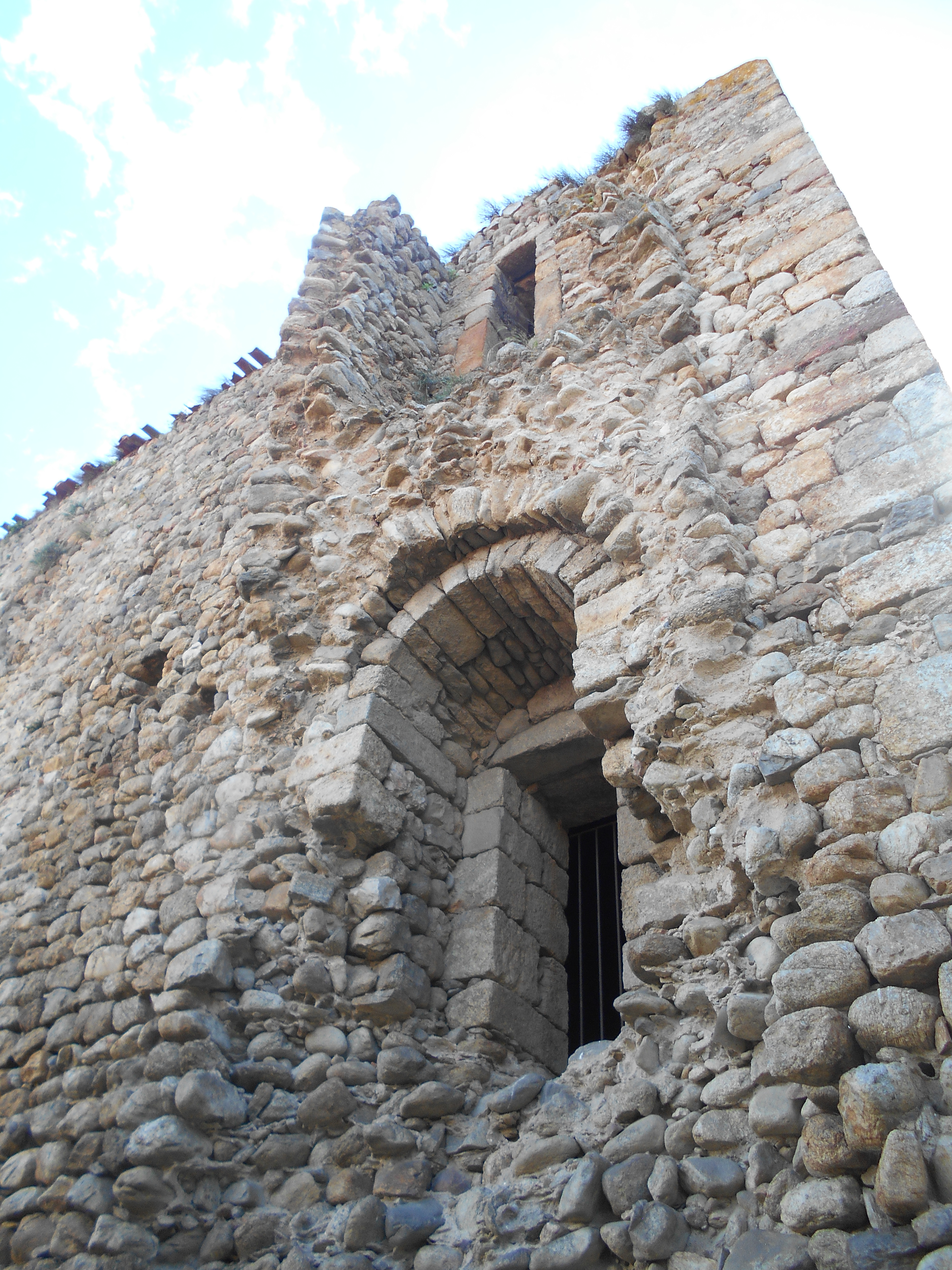 Cara nord del Castell de Pujols